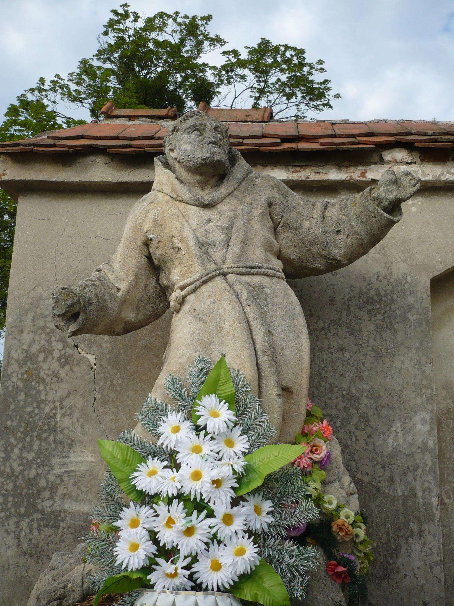 Rzeźba przy klasztorze oo. kapucynów w Olesku